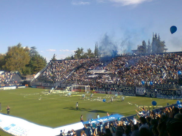 Hinchas de Independiente Rivadavia (La 12)